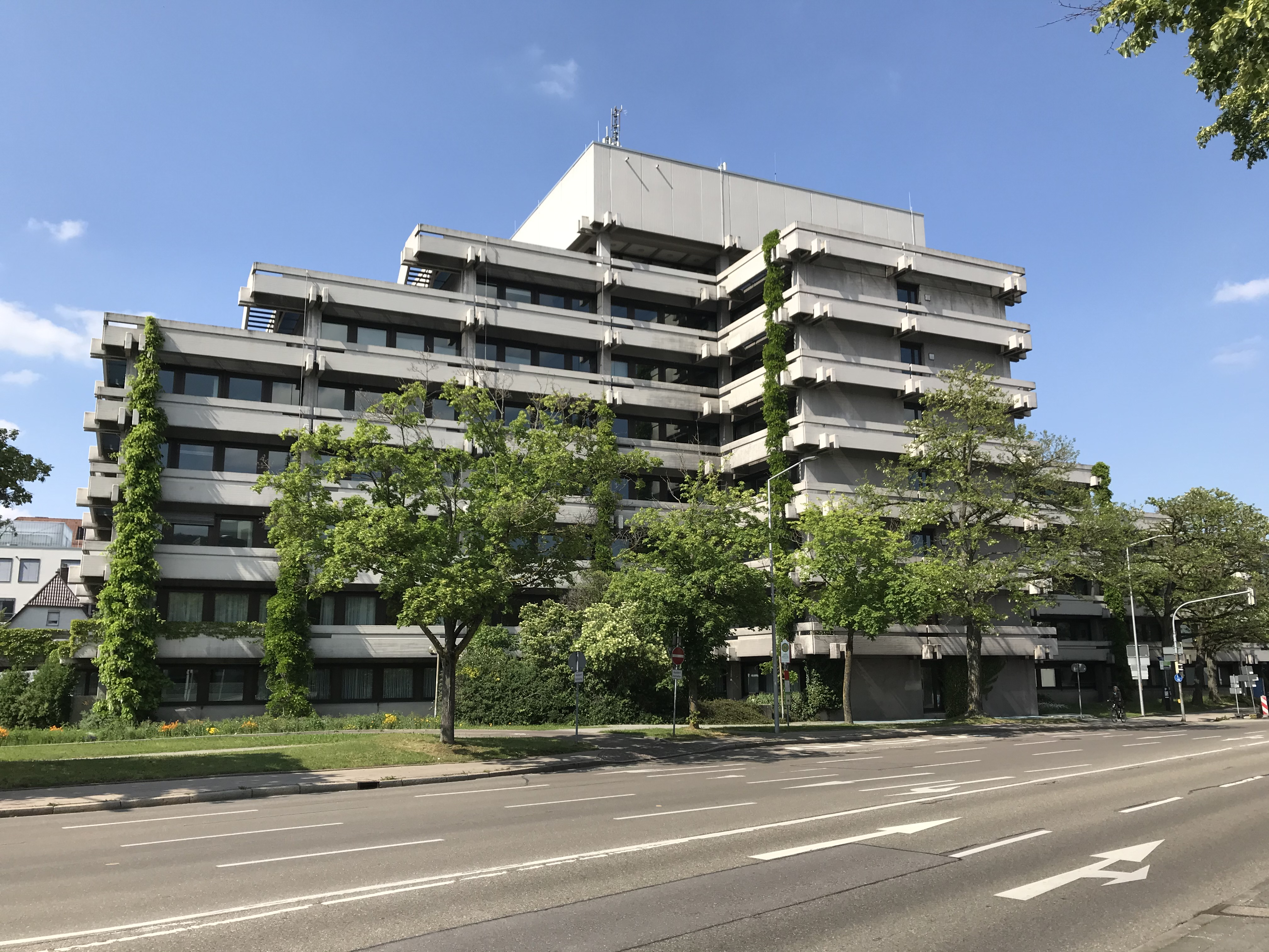 Aalen: Neues Rathaus aus südlicher Richtung, 1975 nach Plänen von Helmut Schaber fertiggestellt, spätes Beispiel für den Architekturstil des Brutalismus